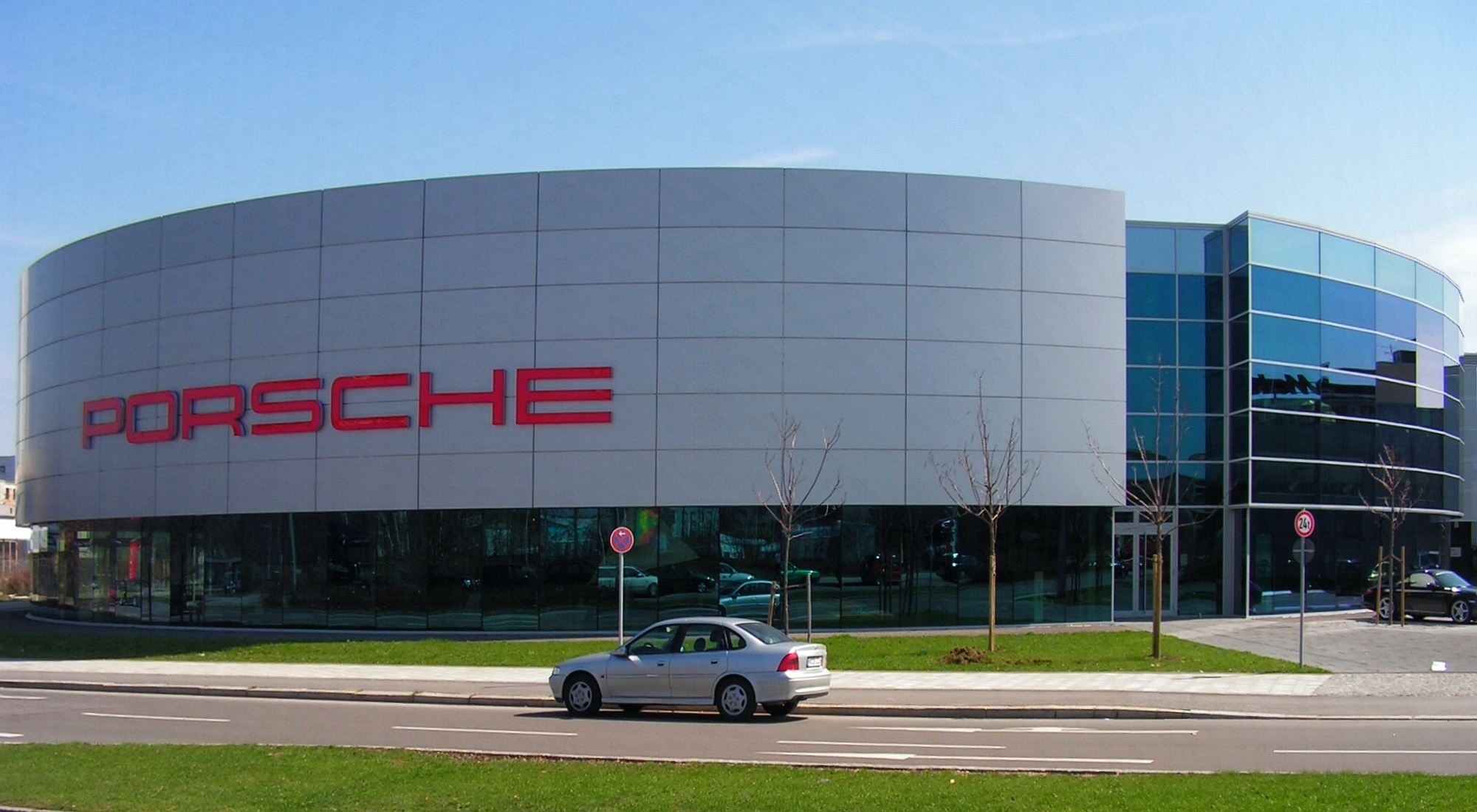 Derzeitiger Architektur-Stil für ein Porsche Zentrum, hier München Süd in der Drygalskiallee 29 (Bayern) - Foto 2005 Wolfgang Pehlemann Steinberg/Ostsee PICT0168